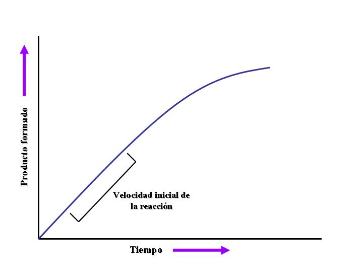 Velocidad de reacción de una enzima donde se puede observar el proceso de saturación a medida que aumenta la cantidad de producto formado.